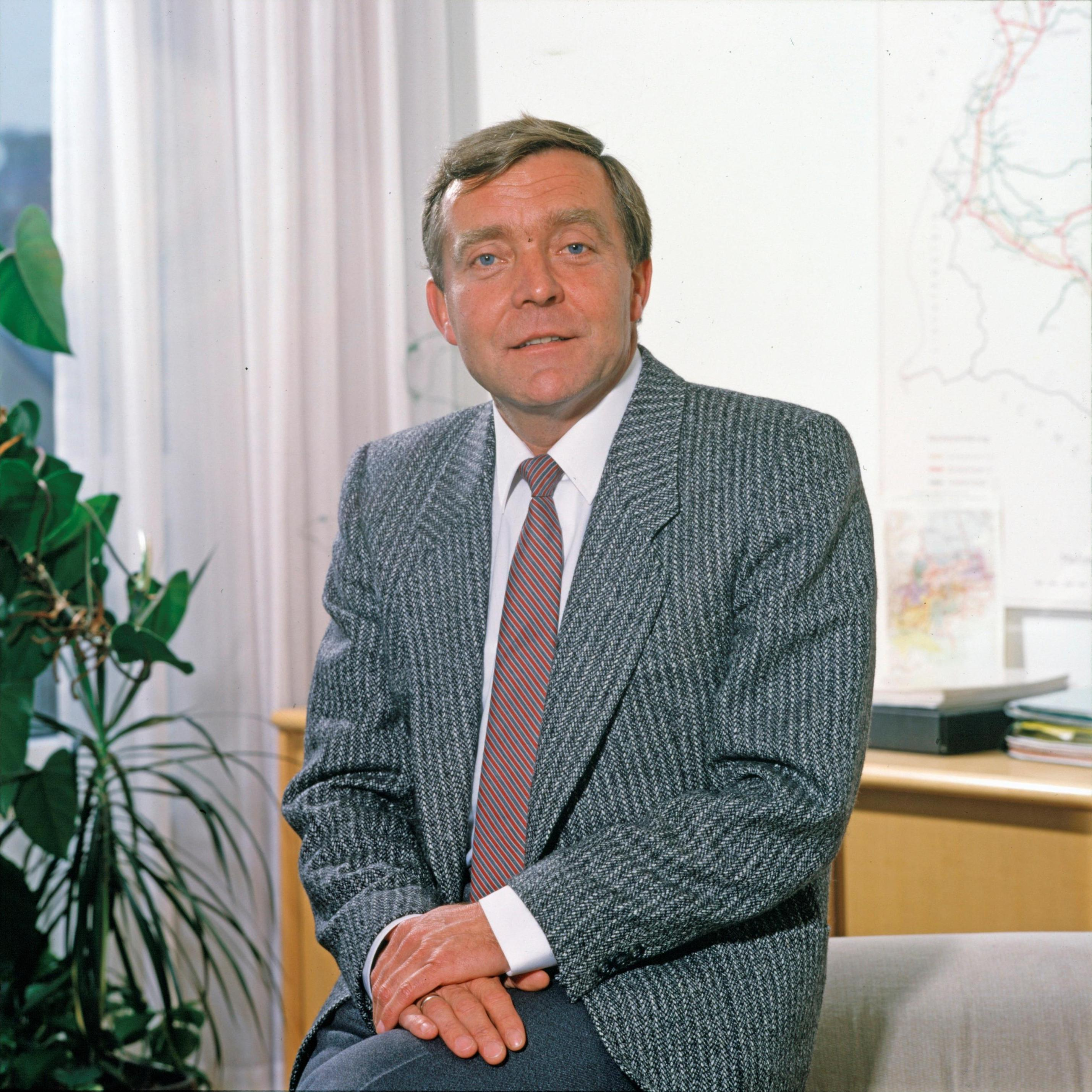 Günter Vetter war Landesrat in der Vorarlberger Landesregierung von 1984 bis 1994. Dies ist eine offizielle Portraitaufnahme vom 12. November 1984